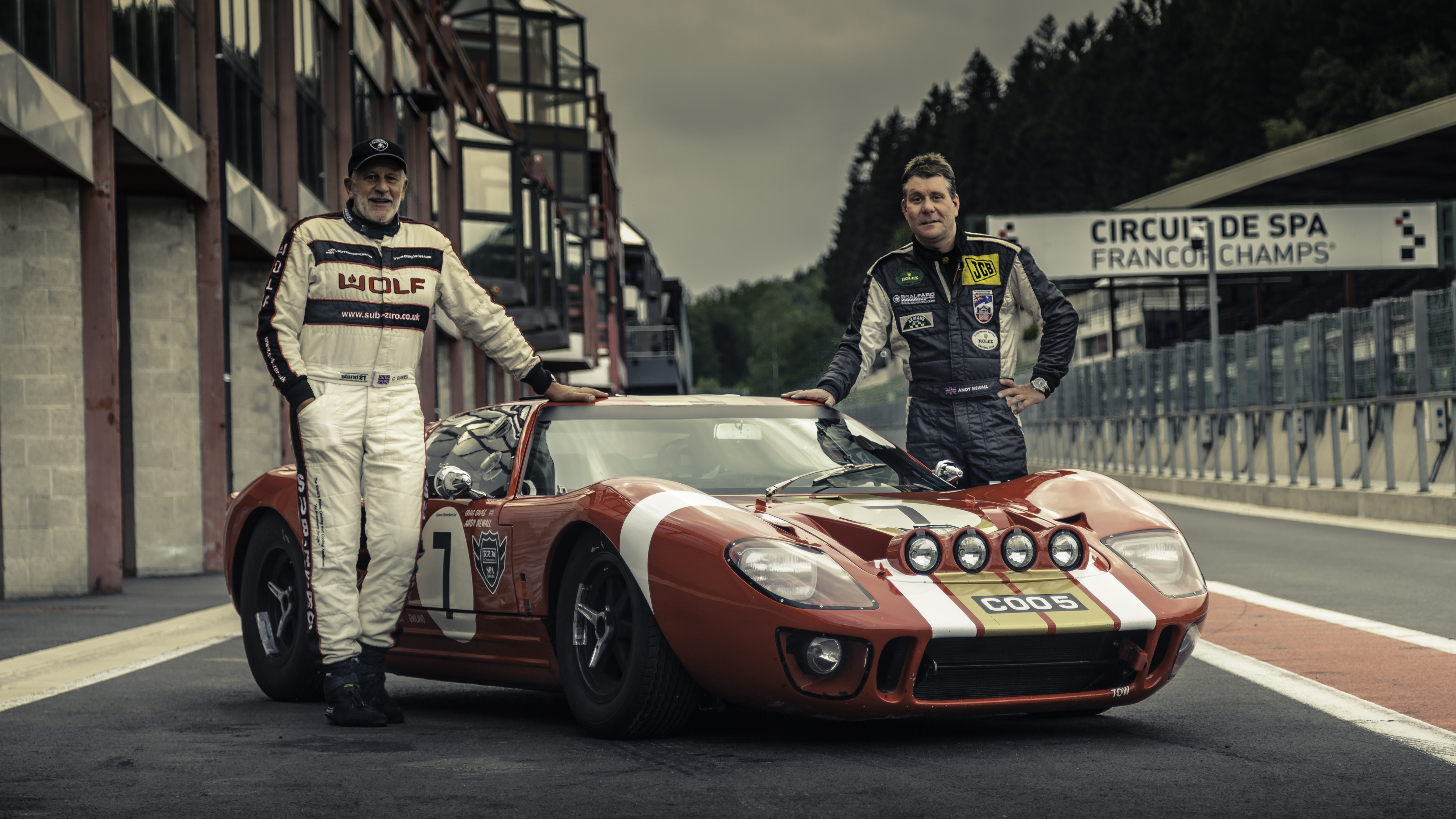 Craig Davies y Andy Newell finalizan en segundo lugar